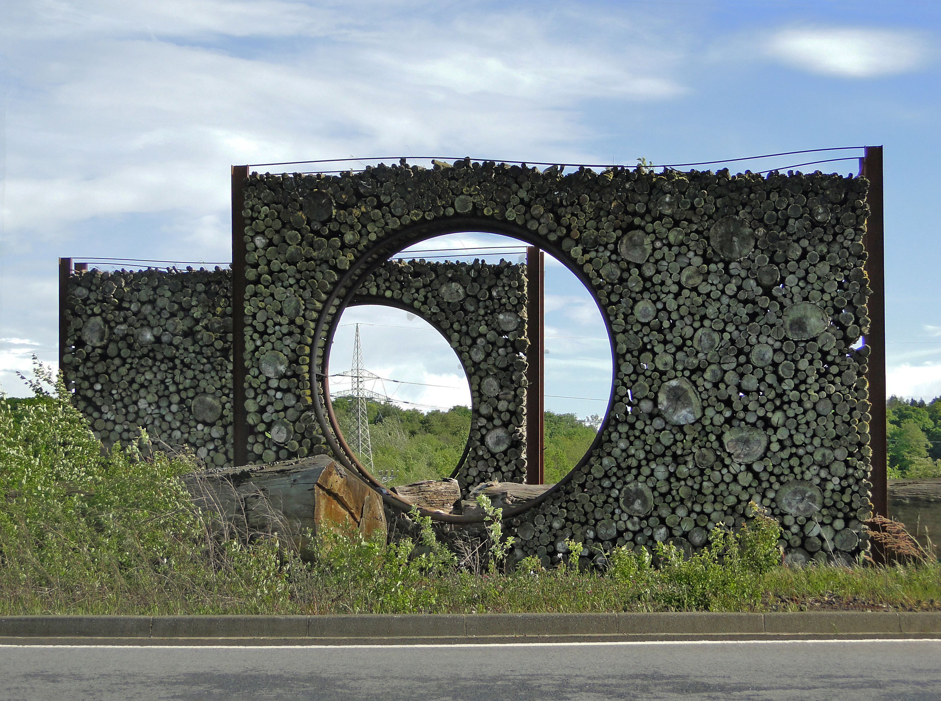 Gasperich - Vue op de rond-point beim Lieu-dit "Scharfen Eck" (Detail)